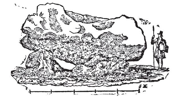 Gravure du dolmen de la Pierre Courcoulée aux Ventes dans l'Eure réalisé par Charles-Léopold de Stabenrath et publié par Auguste Le Prévost en 1832